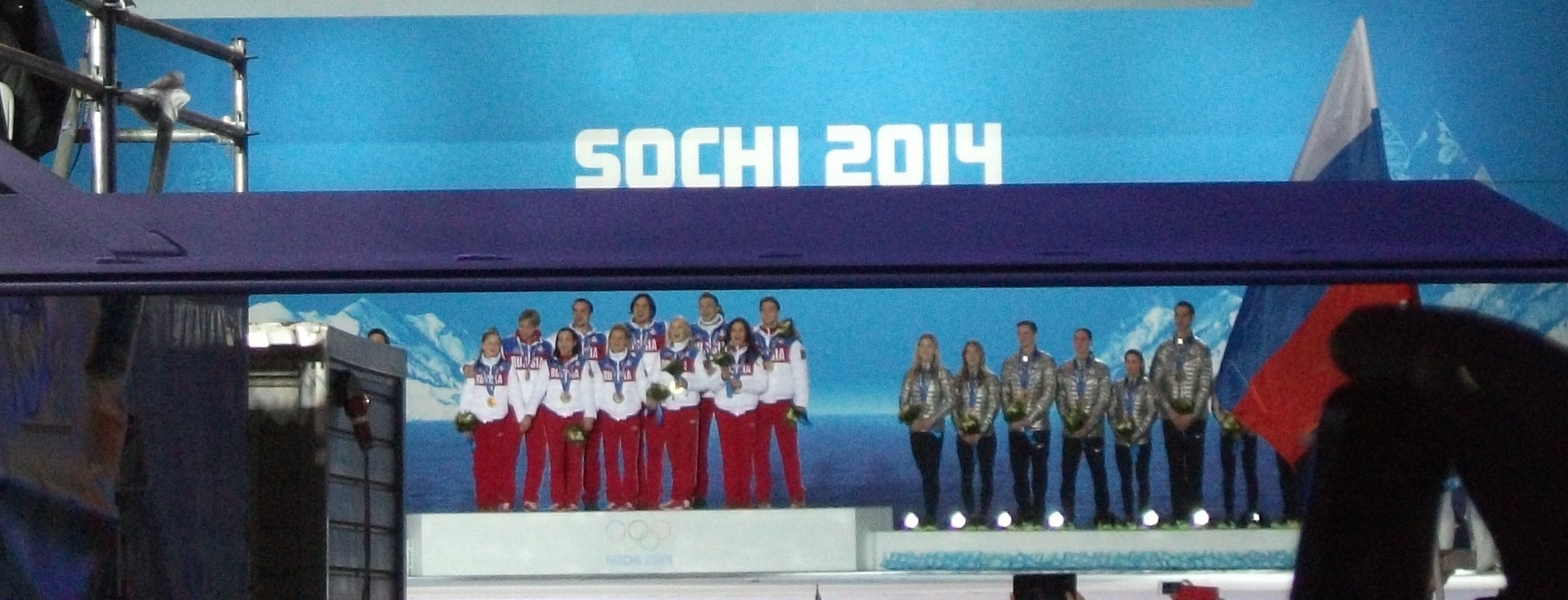 Церемония награждения победителей в командных соревнованиях по фигурному катанию на XXII зимних Олимпийских играх в Сочи